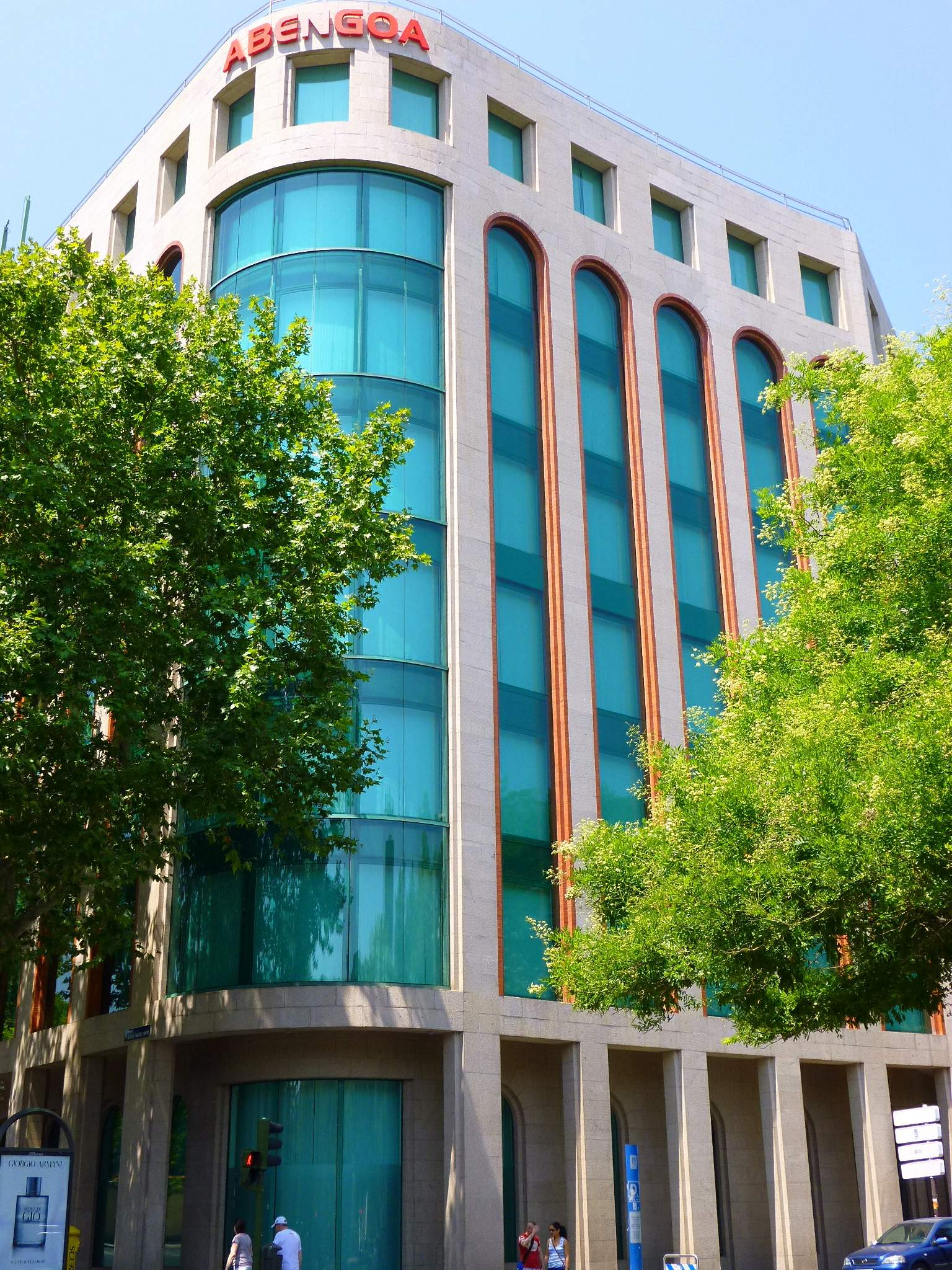 Edificio en el Paseo de la Castellana 43 de Madrid. Fue sede de PwC y acualemente es la sede de Abengoa